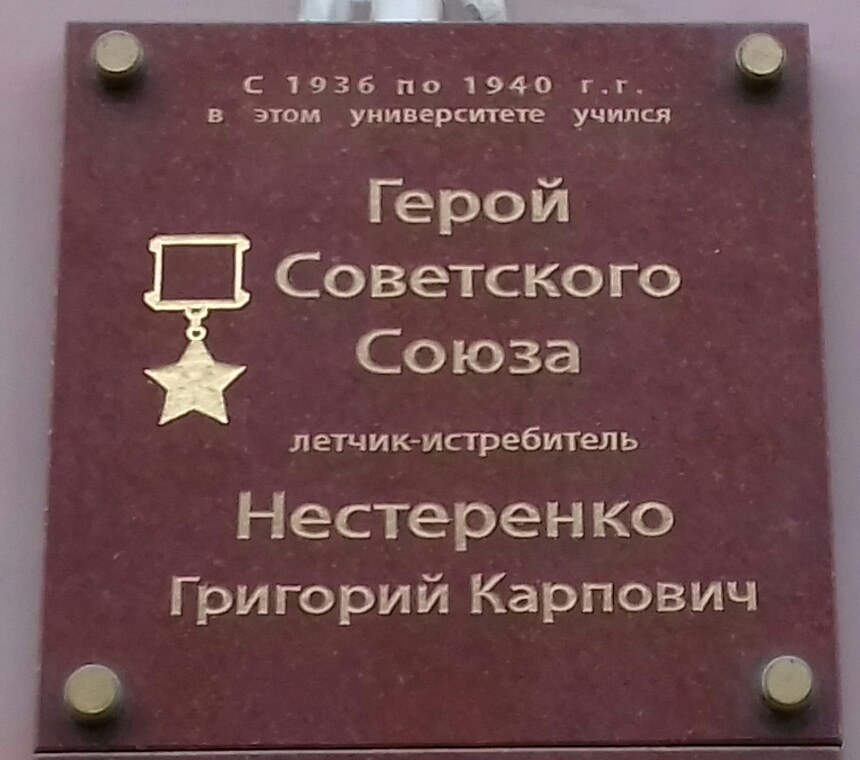 Памятная доска на здании Ростовского государственного экономического университета: «Герой Советского Союза летчик-истребитель Нестеренко Григорий Карпович»